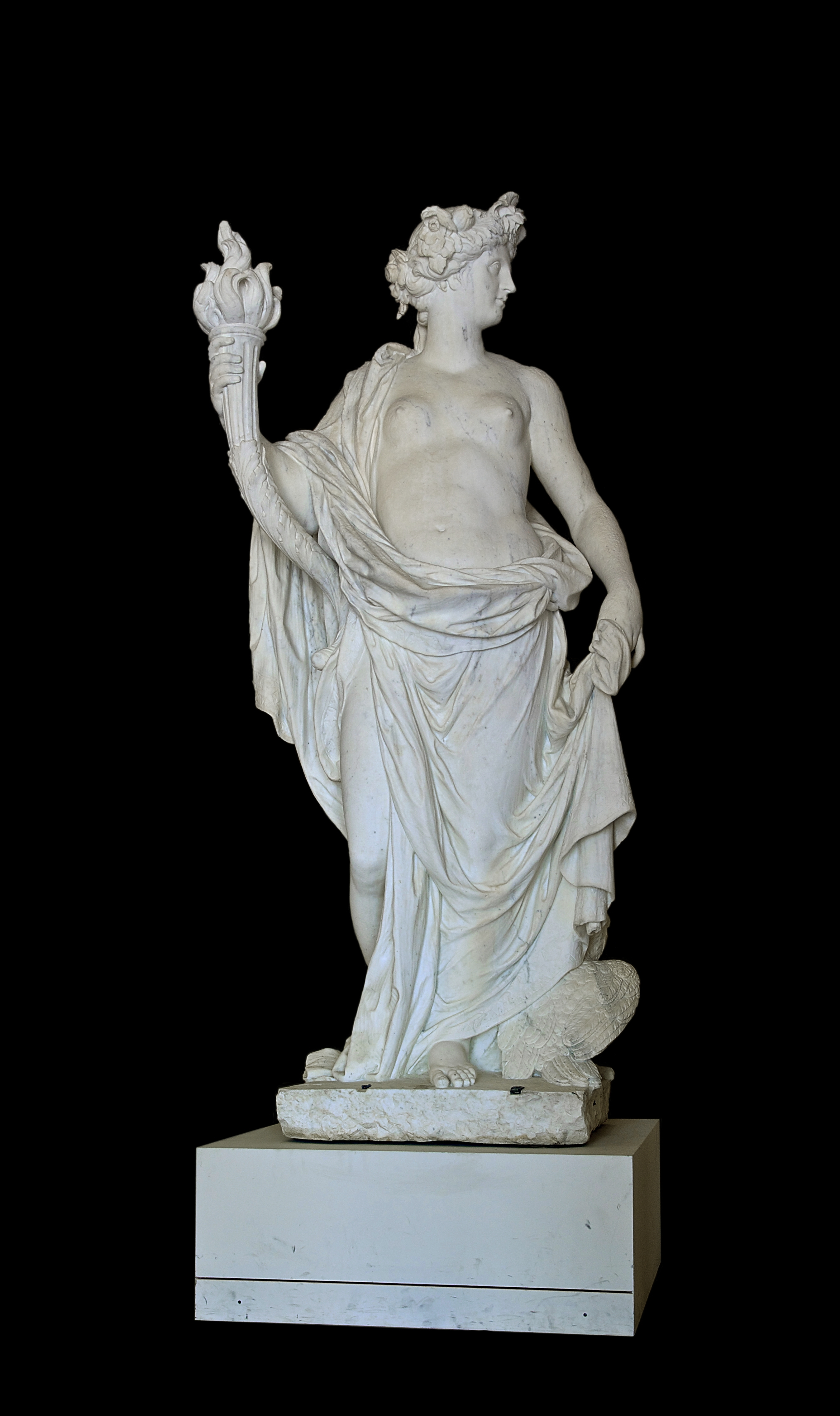 L'allégorie est figurée par une femme couverte d'un ample drapé aux motifs étoilés. Ses attributs sont la torche, qu'elle tient de la main droite, et le hibou, placé à sa gauche.